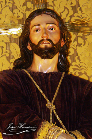 Santísimo Cristo del Perdón (1821). Fernando Estévez de Salas (1788-1854) Parroquia Matriz de El Salvador, Santa Cruz de La Palma. Canarias